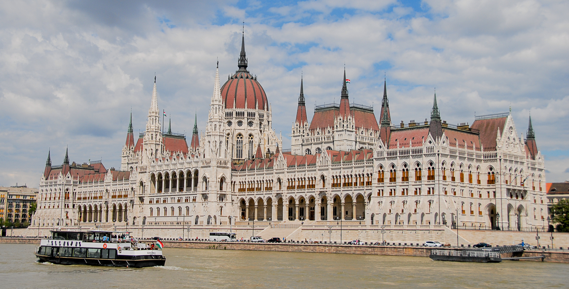 Parlamentsgebäude in der ungarischen Landeshauptstadt Budapest im Sommer 2016.